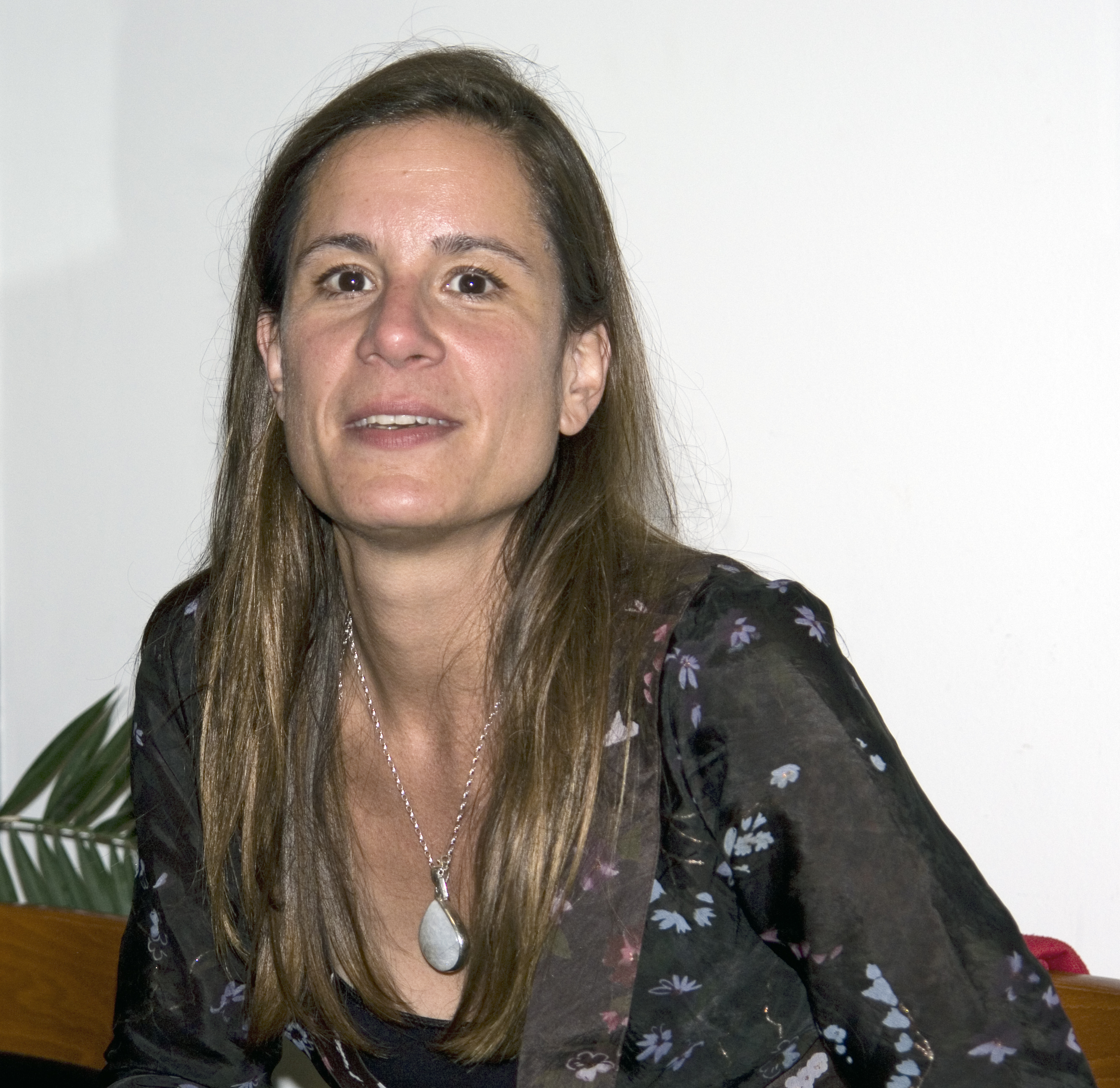 Isabel Abedi, deutsche Schriftstellerin